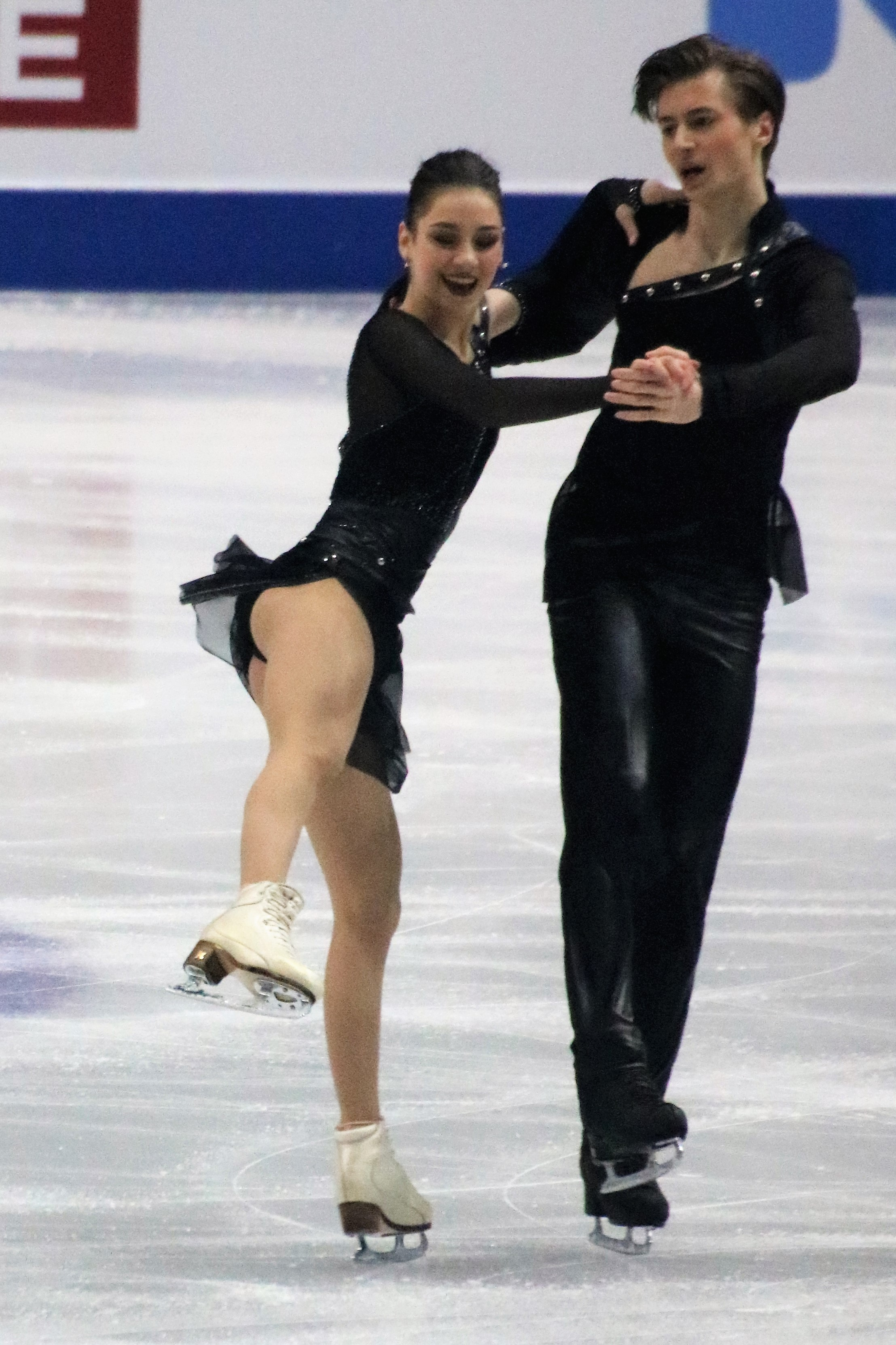 Елизавета Шанаева и Девид Нарижный (Россия) на финале Гран-при среди юниоров 2019-2020